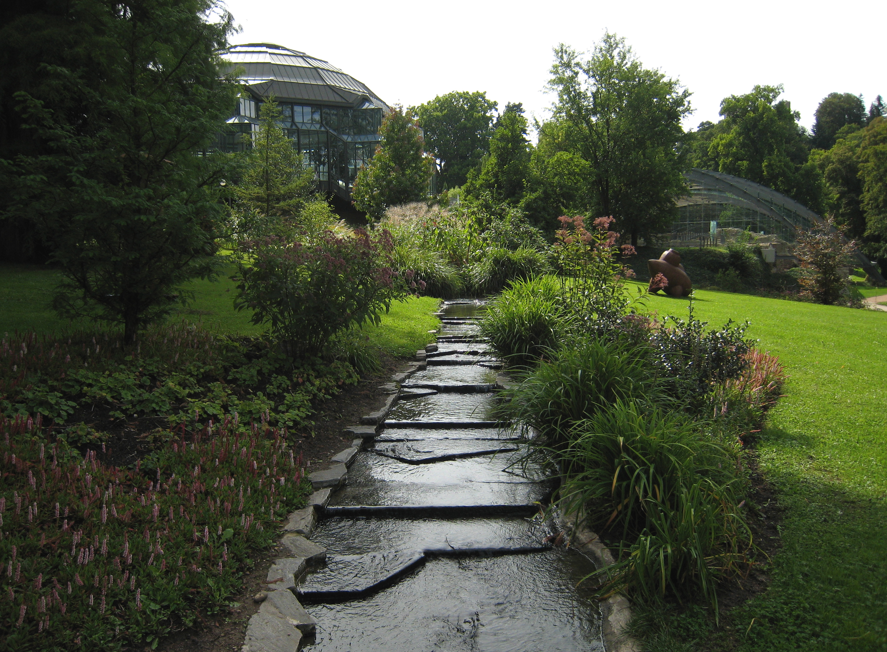 Bachlauf im Kurpark von Badenweiler; im Hintergrund das Kuppelbad. Badenweiler/Süd-Schwarzwald/Deutschland